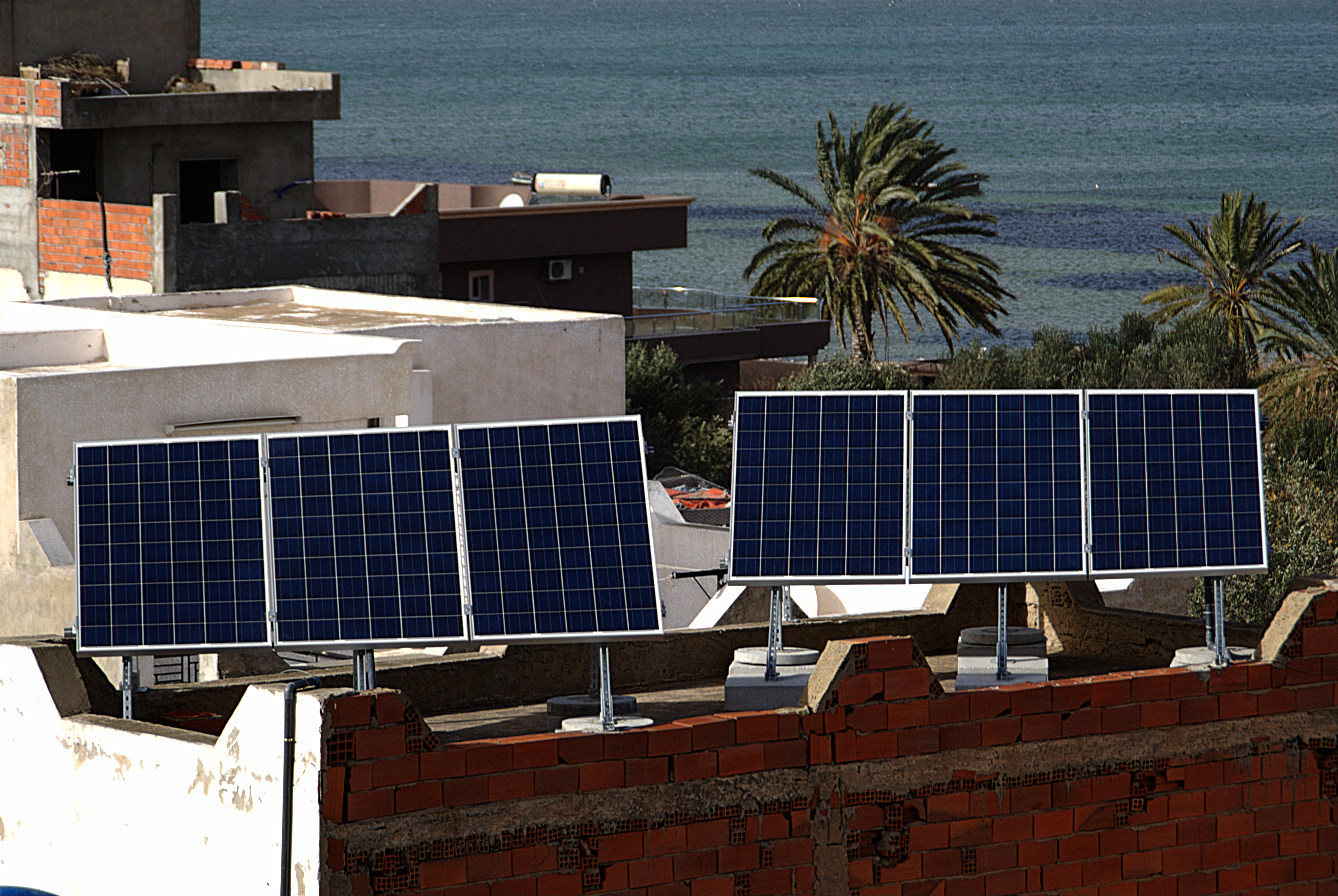 Panneaux électriques sur le toit d'une habitation individuelle dans la ville de Sayada, Tunisie